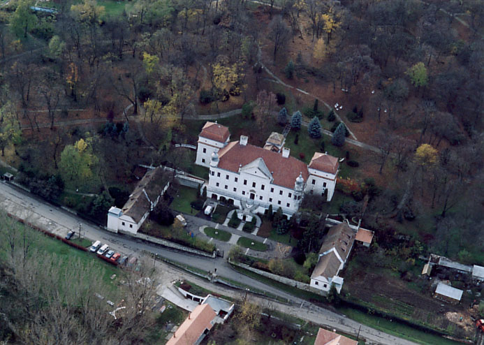 Palace - Szirák - Hungary - Europe